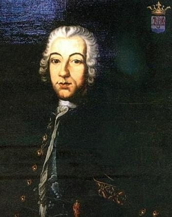 Scan eines alten Familienporträts von Nicolas Joseph Grand Ry (1709-1763), Bürgermeister von Eupen